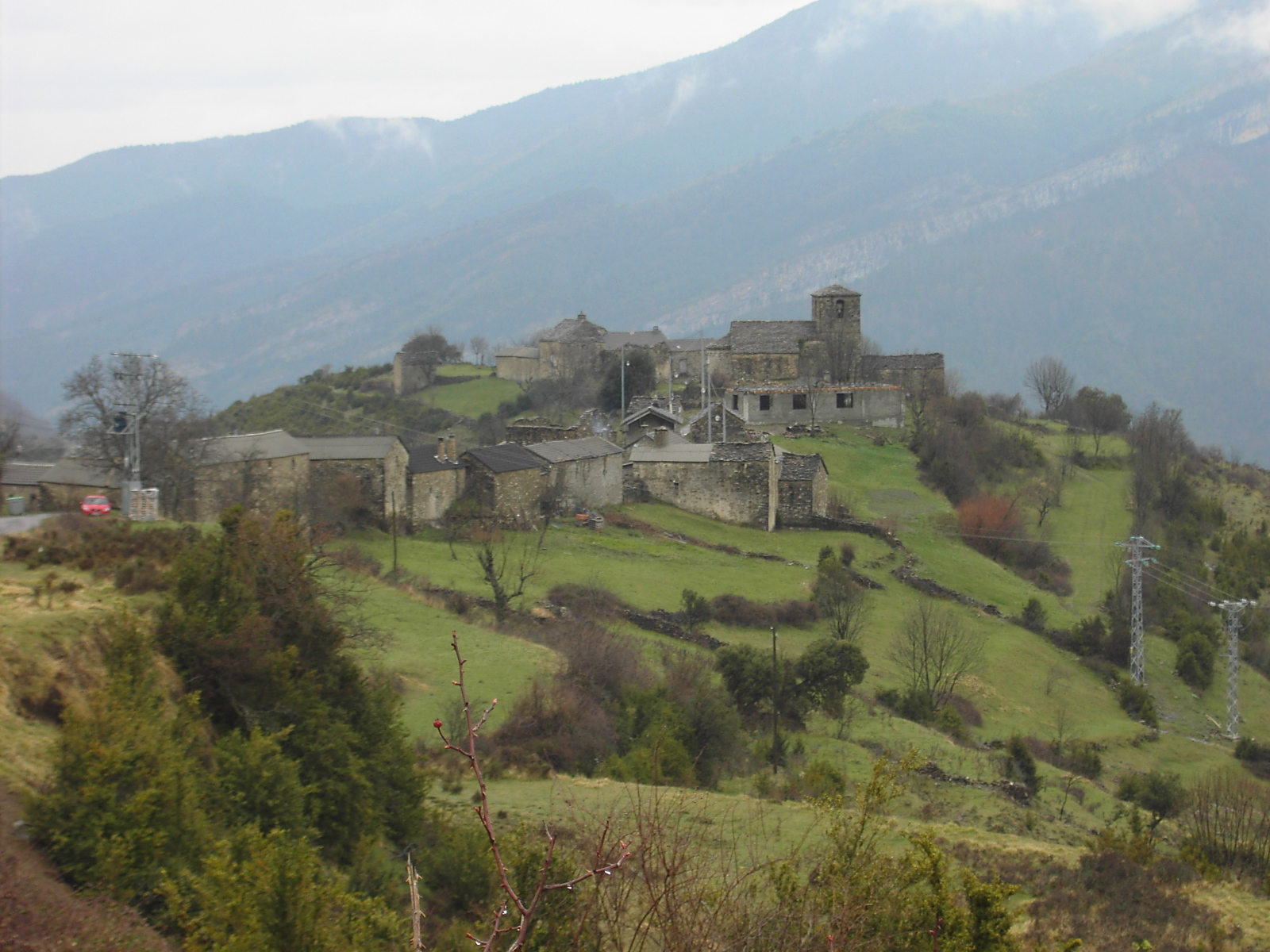 Vista general de Vió, antigua cabecera del Valle de Vió, en la comarca oscense de Sobrarbe.